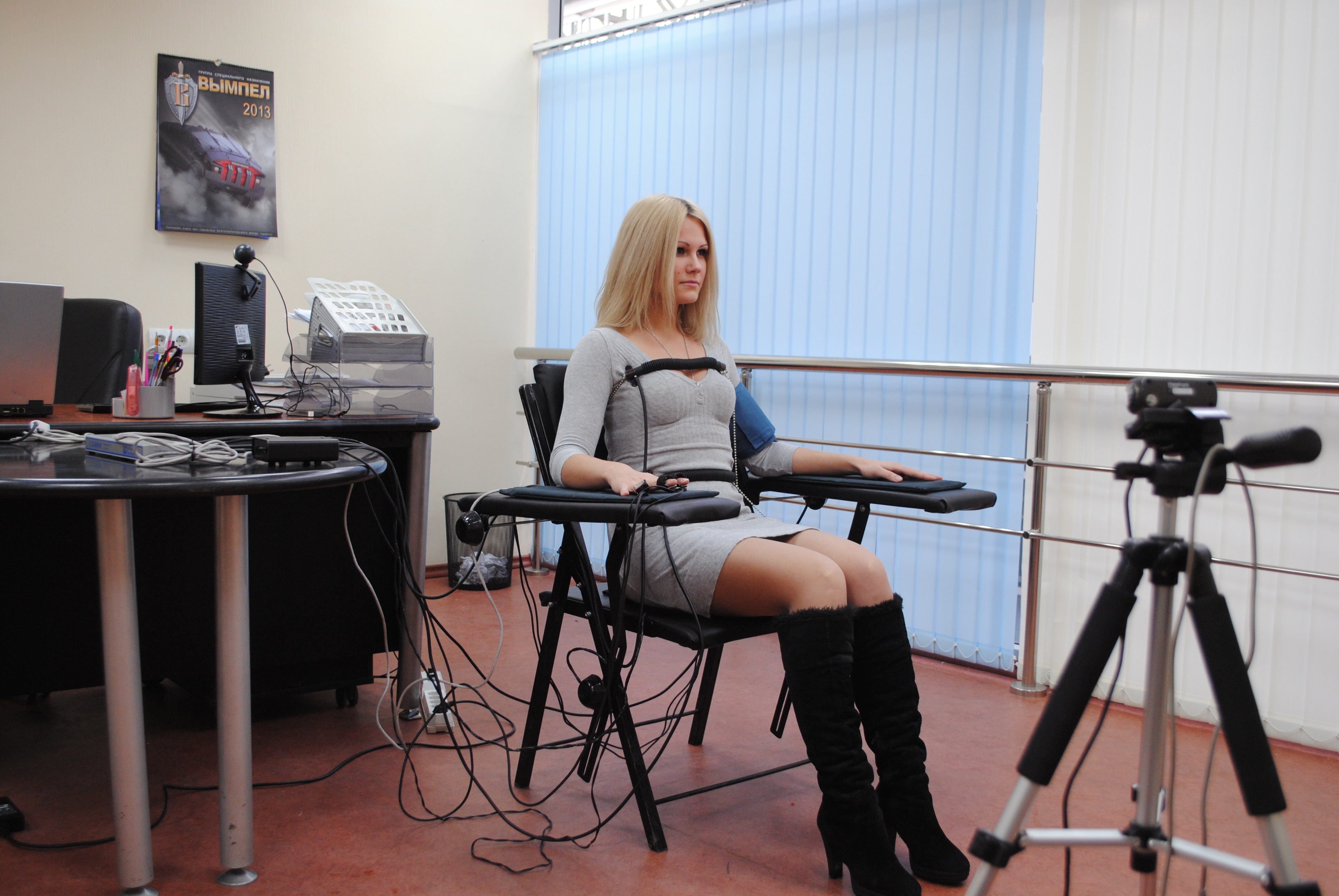 Тестирование с использование полиграфа, специализированное кресло, прибор Lafayette LX 5000